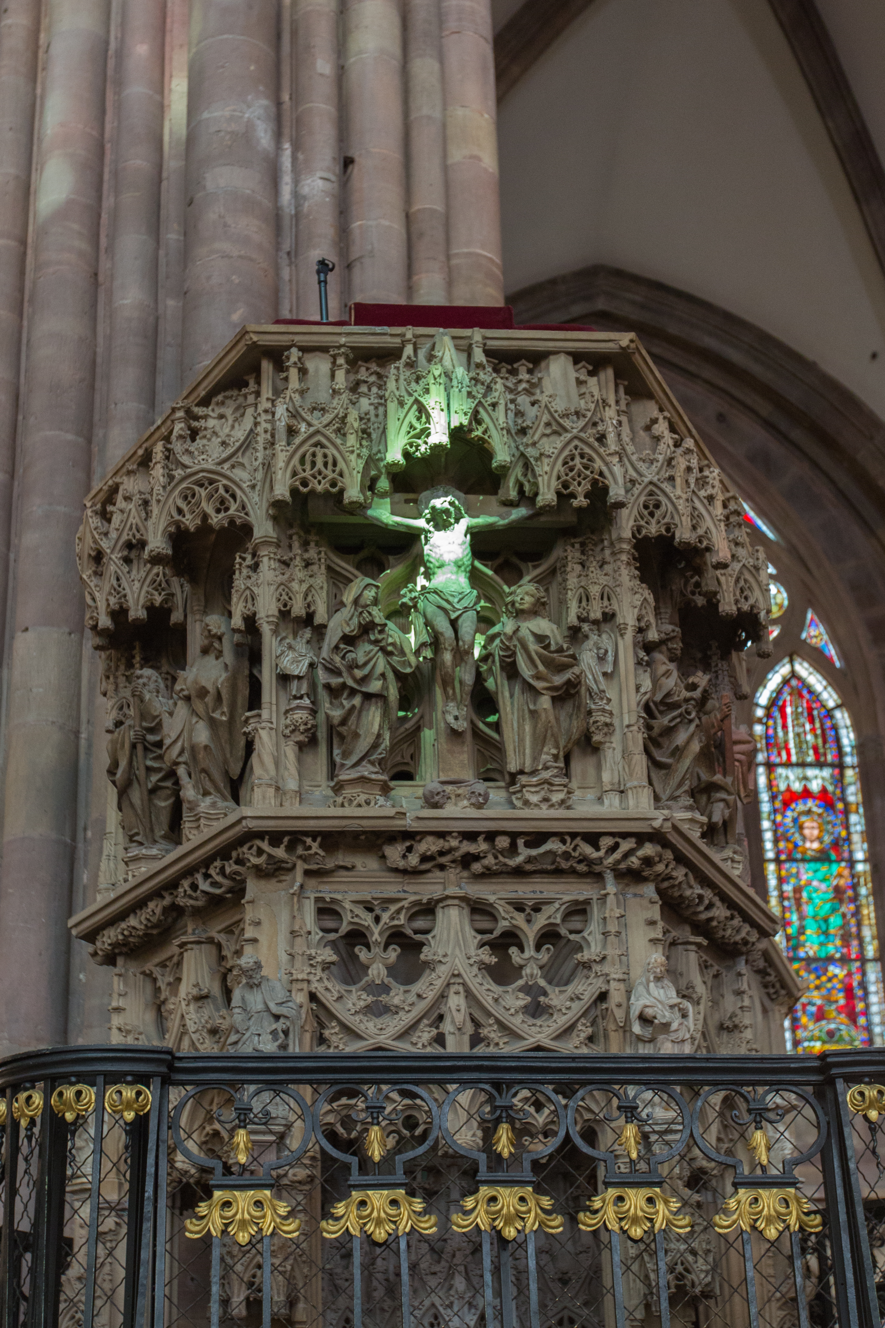 Le Rayon vert apparait sur la chaire de Geiler à la cathédrale Notre-Dame de Strasbourg le jour de l'équinoxe d’automne